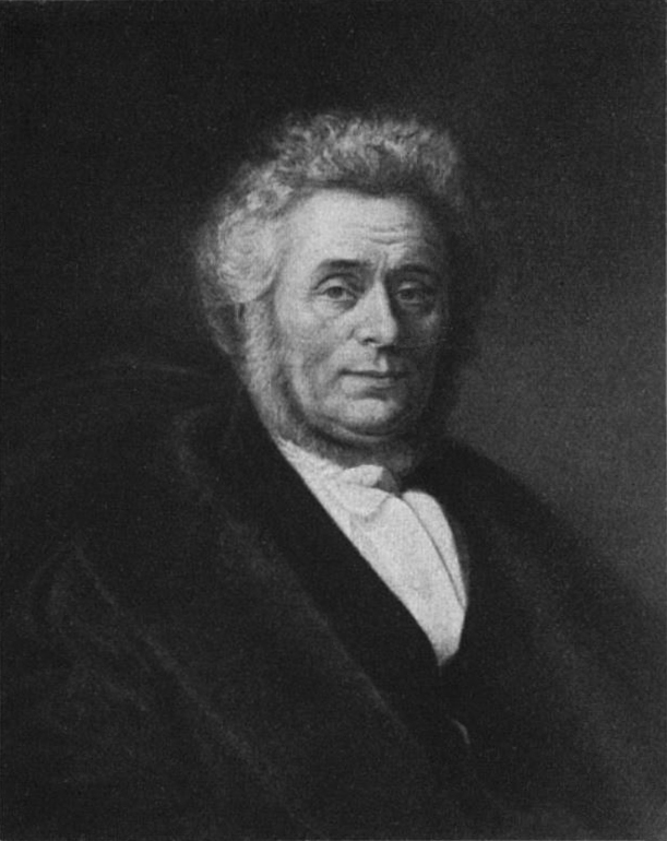 Johann Matthias Commeter von Hermann Steinfurth nach einem Gemälde von Robert Schneider. Öl auf Leinwand, 61,5 × 75 cm – Auftragsarbeit für die Hamburger Kunsthalle (Schwarz-weiß-Abbildung)